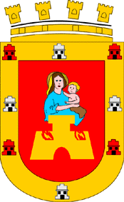 Escudo de Trujillo (Honduras) Imagen realizada por J. Ollé Véase también: Wikipedia:Autorizaciones/Banderas de Jaume Ollé Categoría:Banderas (imagen)